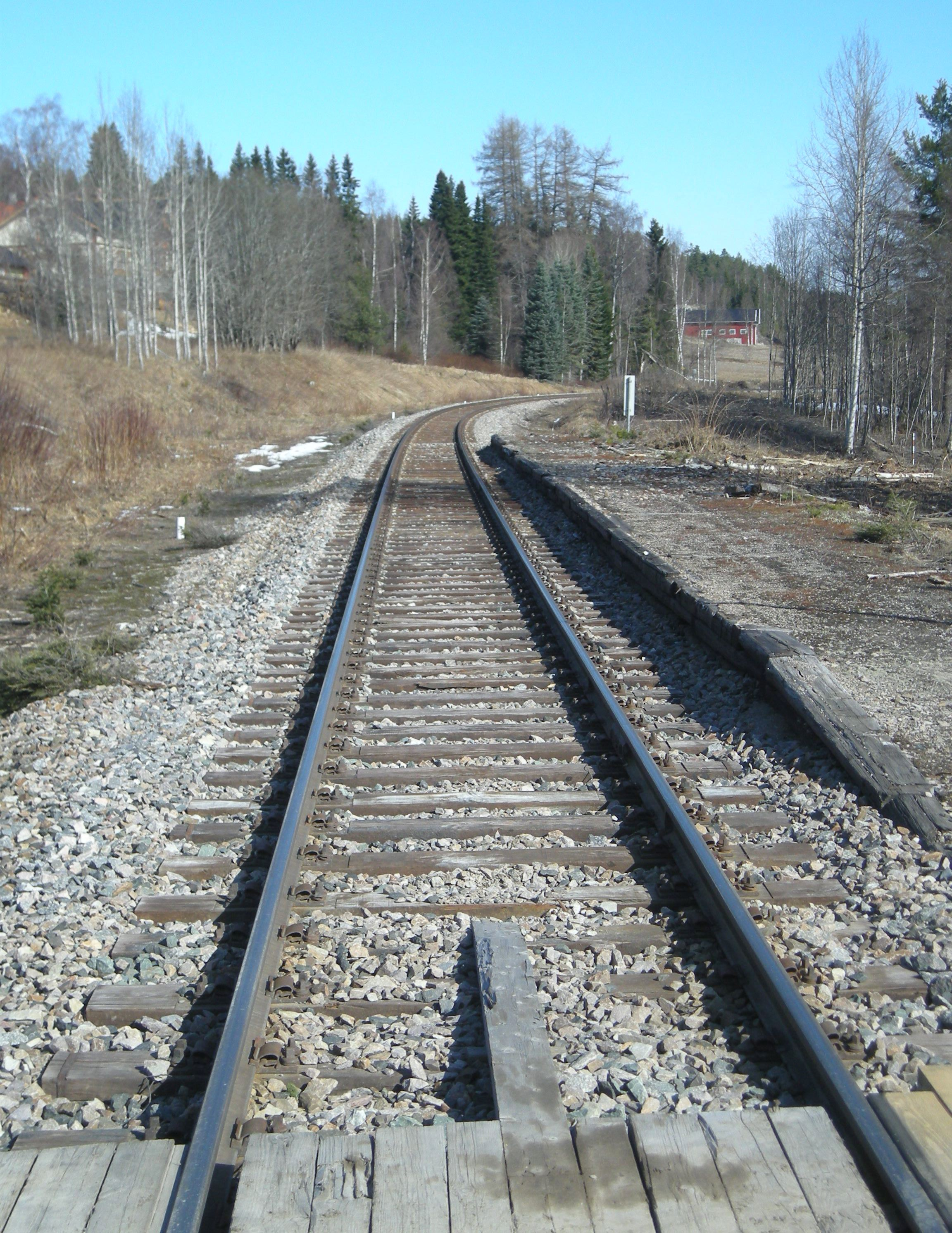 Nedlagte Åsta holdeplass (stasjon før 1966) i 2010